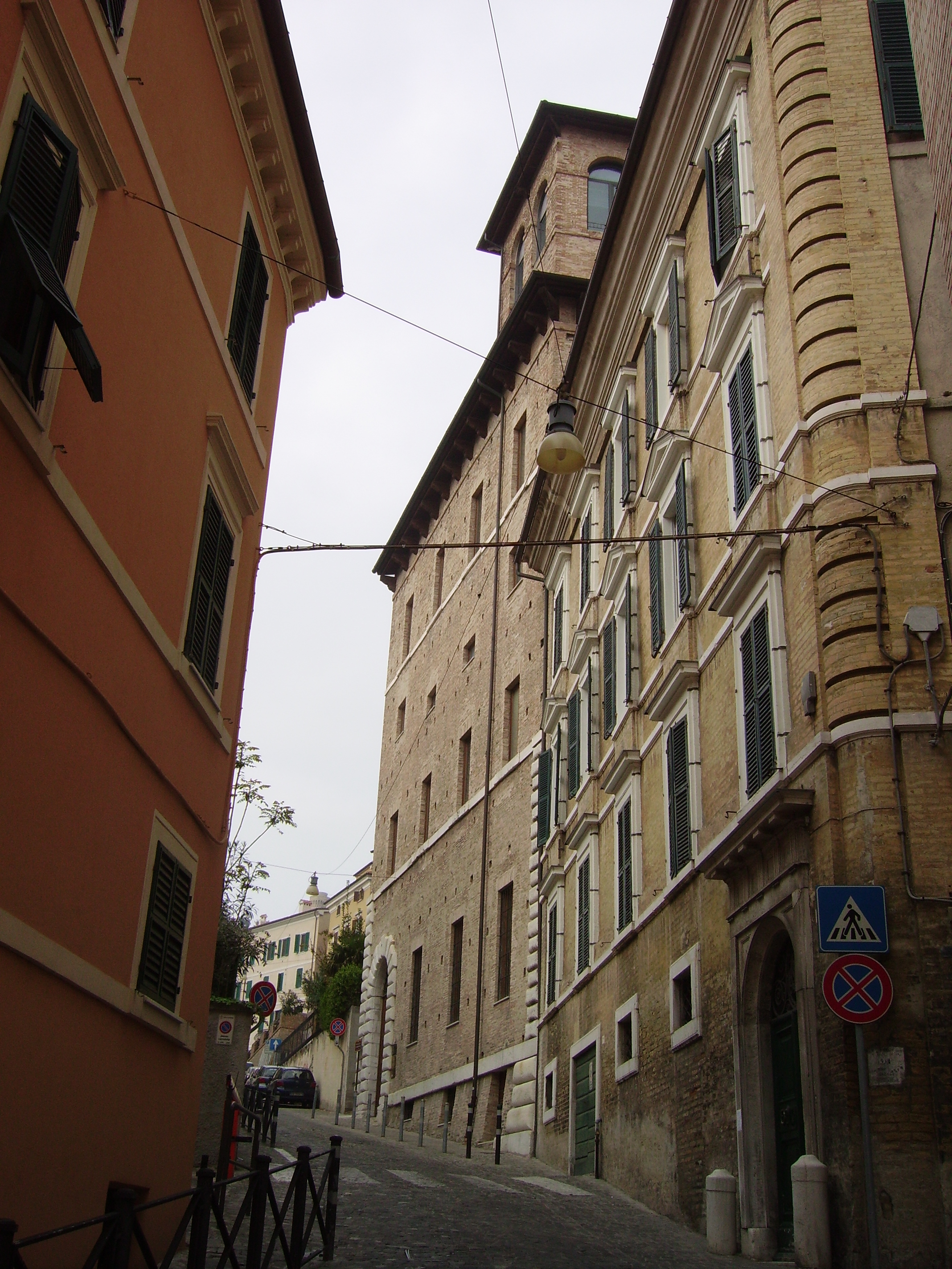 Palazzo Camerata ad Ancona.